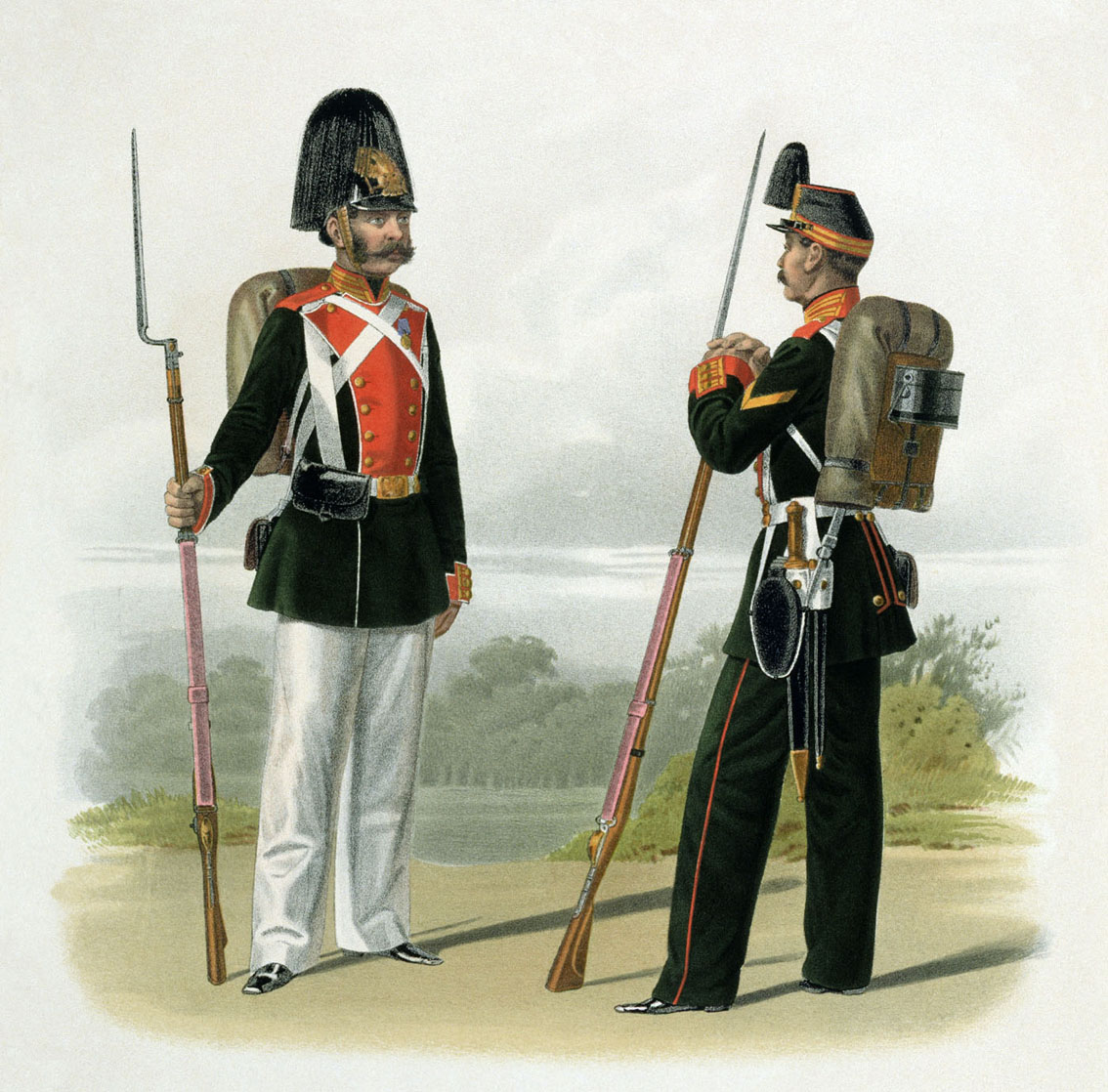 Рядовые полков Лейб-Гвардии Преображенского и Московского. 4 августа 1862. (в парадной строевой форме).